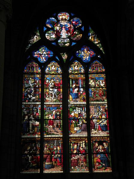 Verrière de l'enfance du Christ. Cathédrale Saint-Étienne de Châlons-en-Champagne (51).